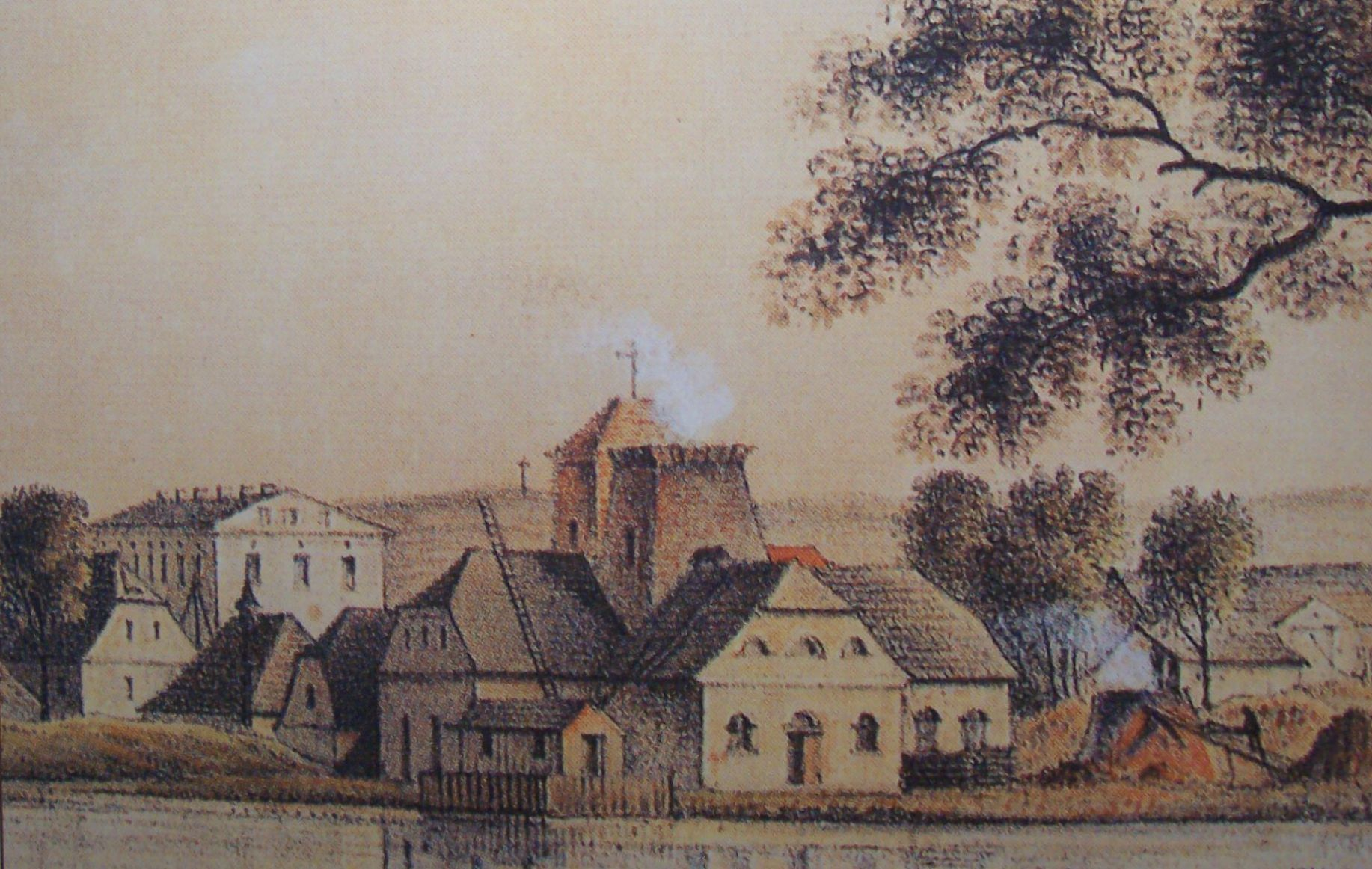 Widok na Kuźnicę Bugucką